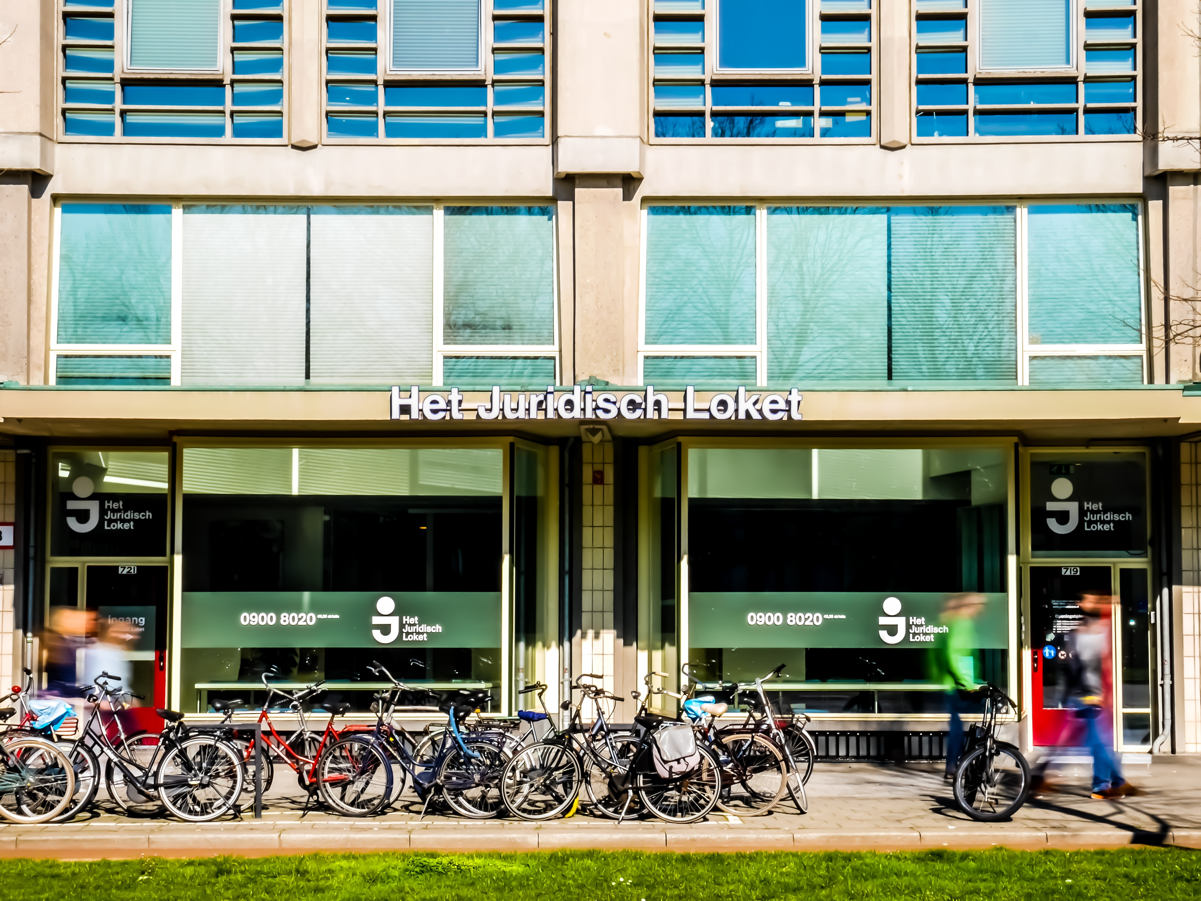 Juridisch Loket Rotterdam